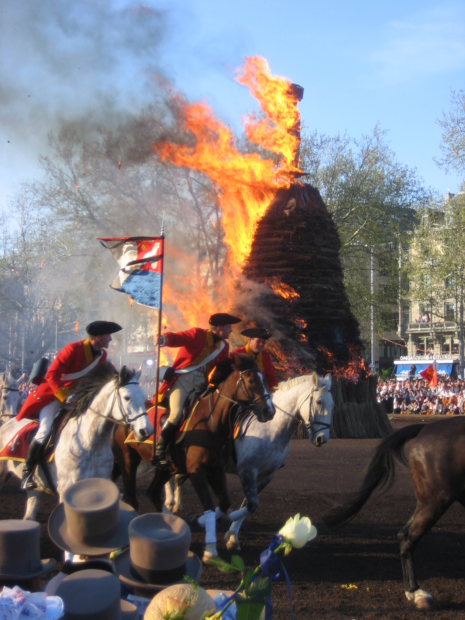 Umritt am Sechseläuten 2007